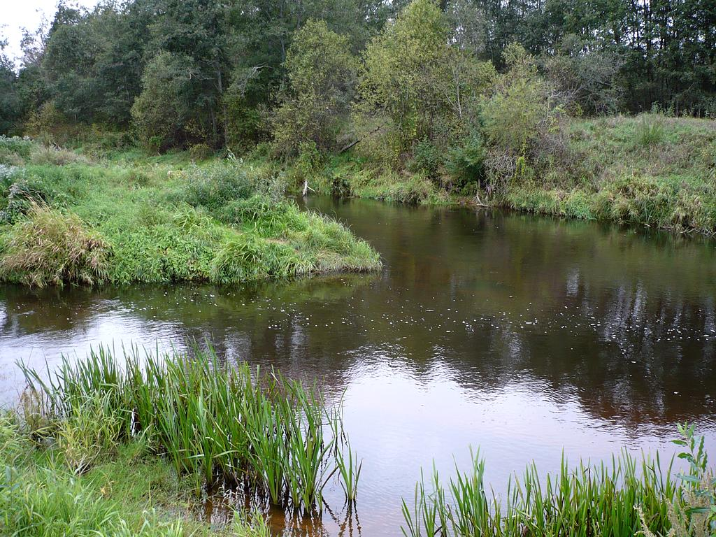 Tirzas ieteka Gaujā. 2008-09-14